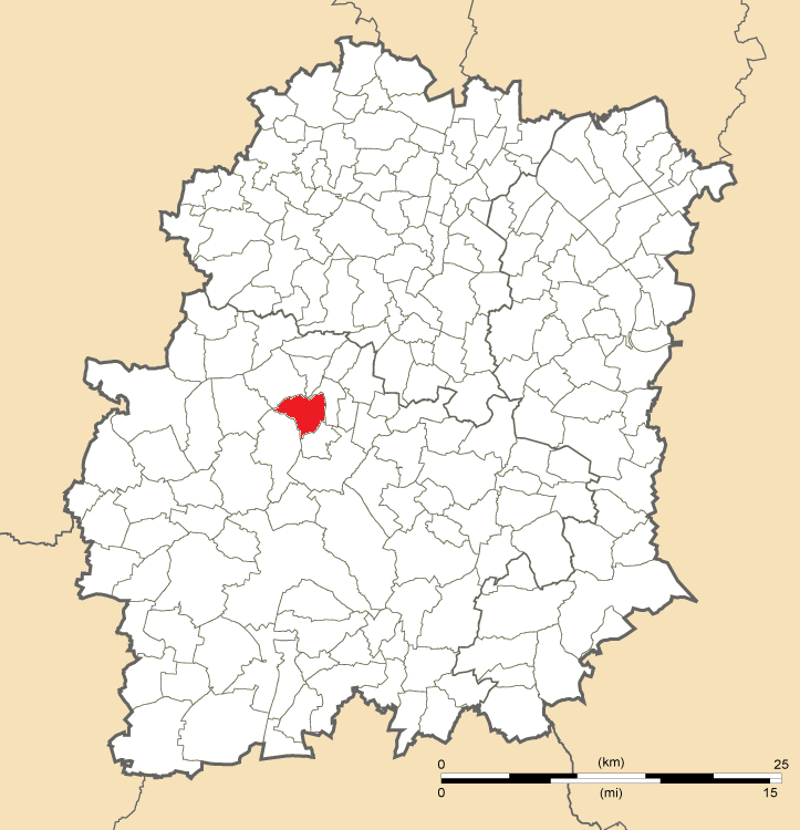 Carte de position de Souzy-la-Briche en Essonne (91)